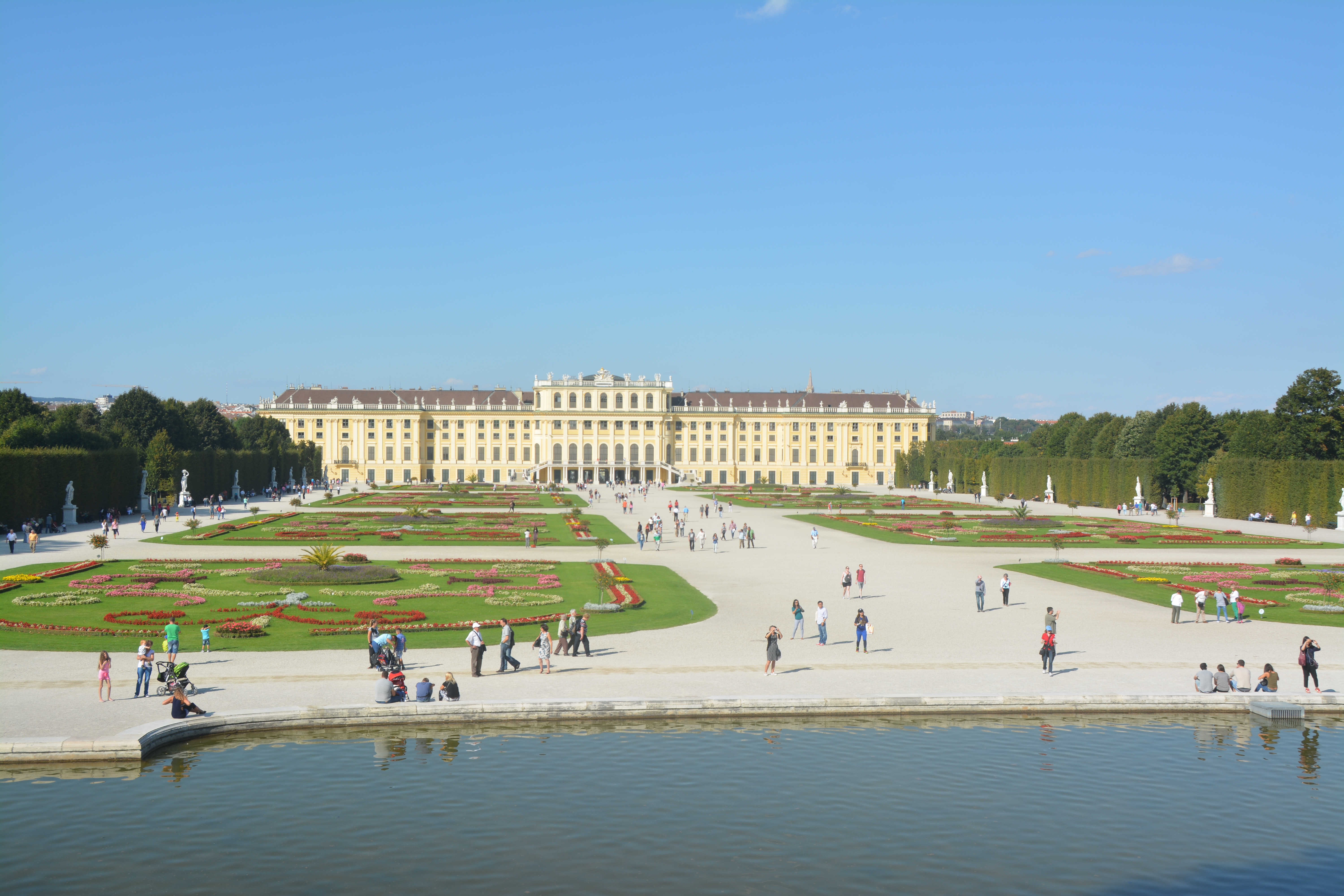 voyage en Europe